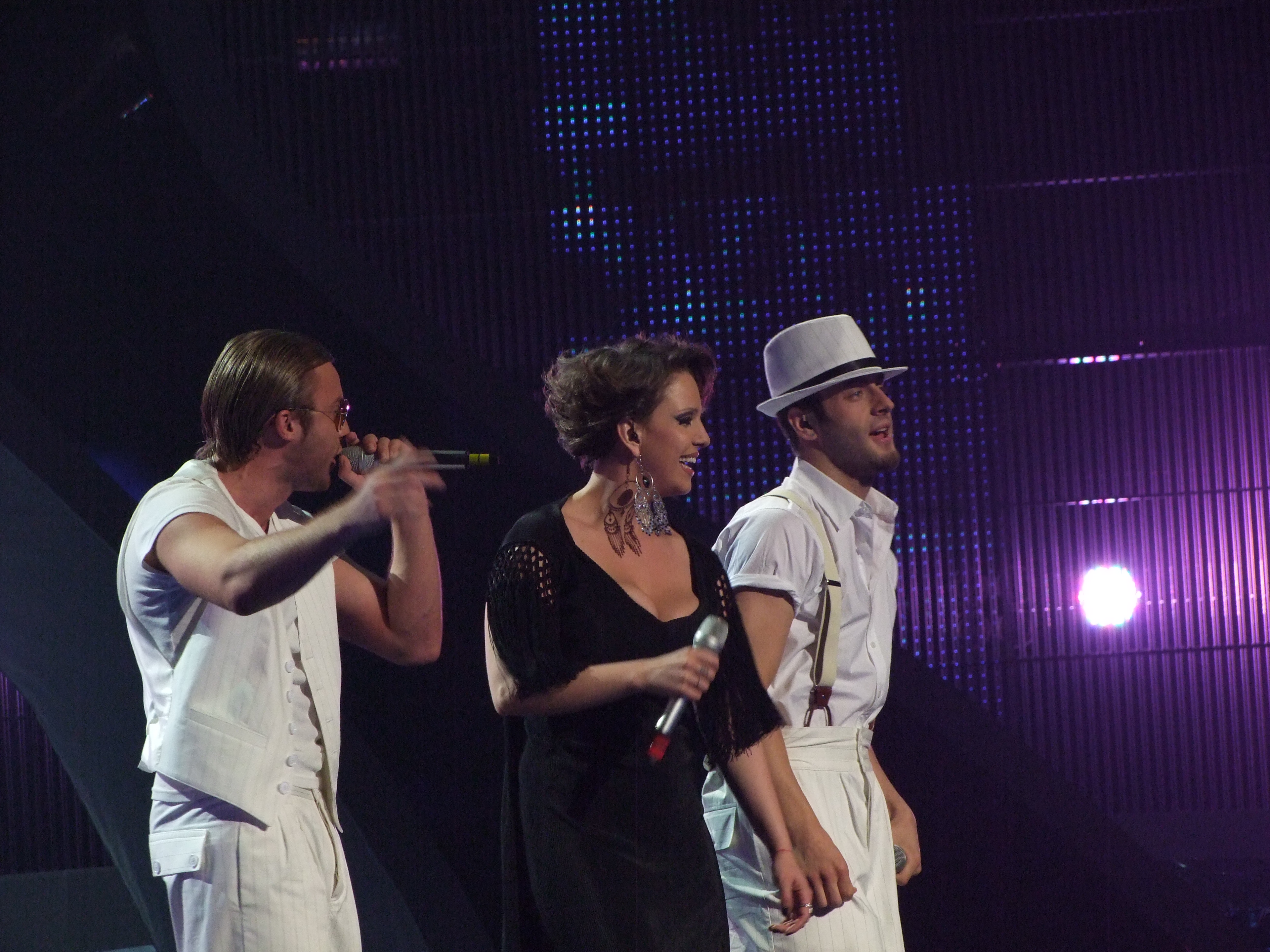 Semifinal 2 Eurovision 2008